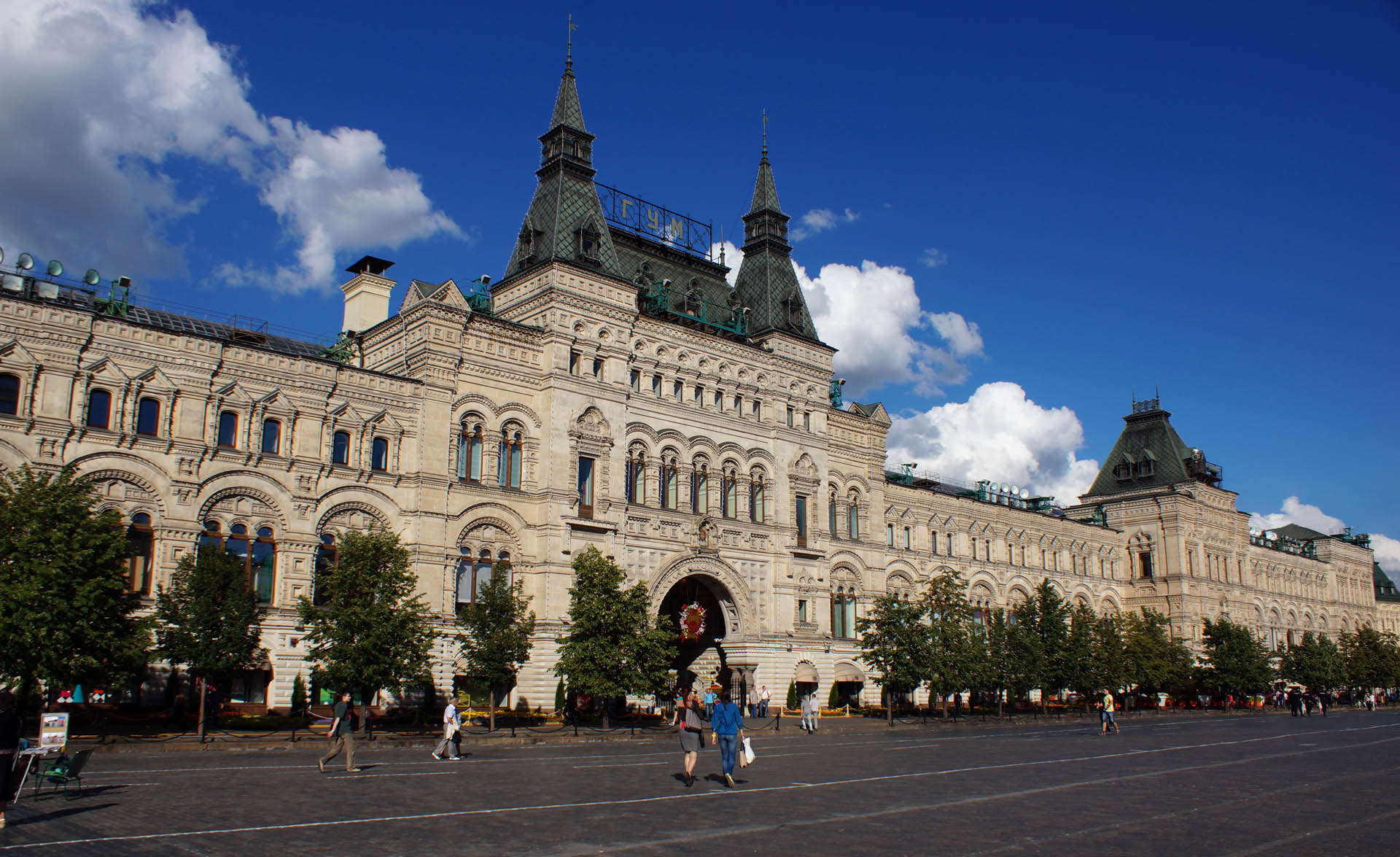 De GUM Buttek zu Moskau